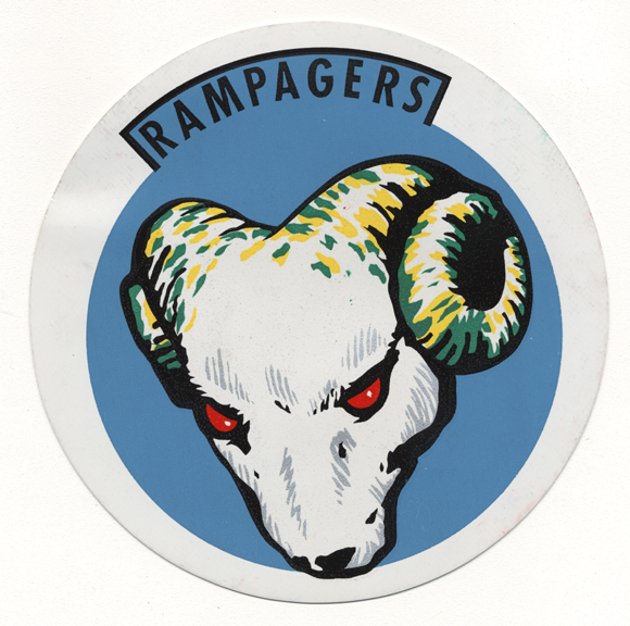 Strike Fighter Squadron 83 insignia